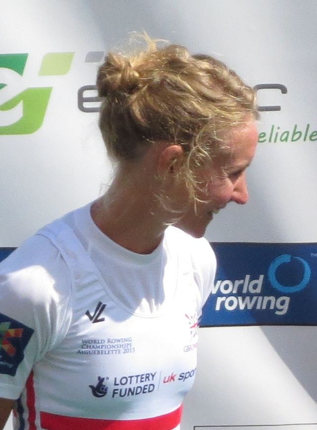 Podium LW1x NZL : MCBRIDE, Zoe GBR : WALSH, Imogen USA : BERTKO, Kathleen